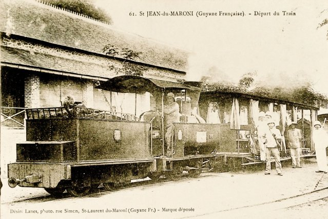 St Jean-du-Maroni (Guyane Francaise) - Depart du Train